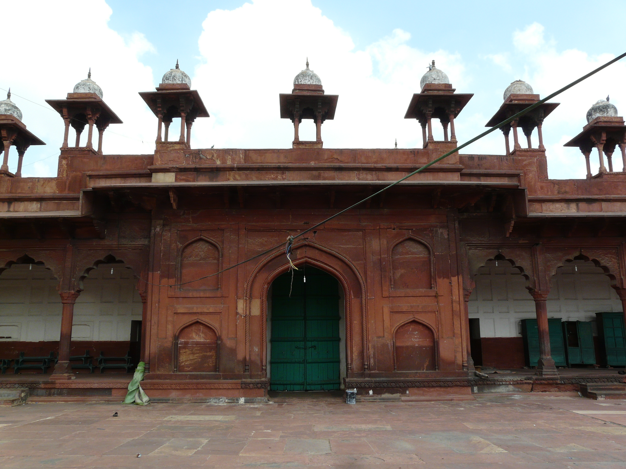 Jama Masjid side gateway Jama Masjid, Agra, India